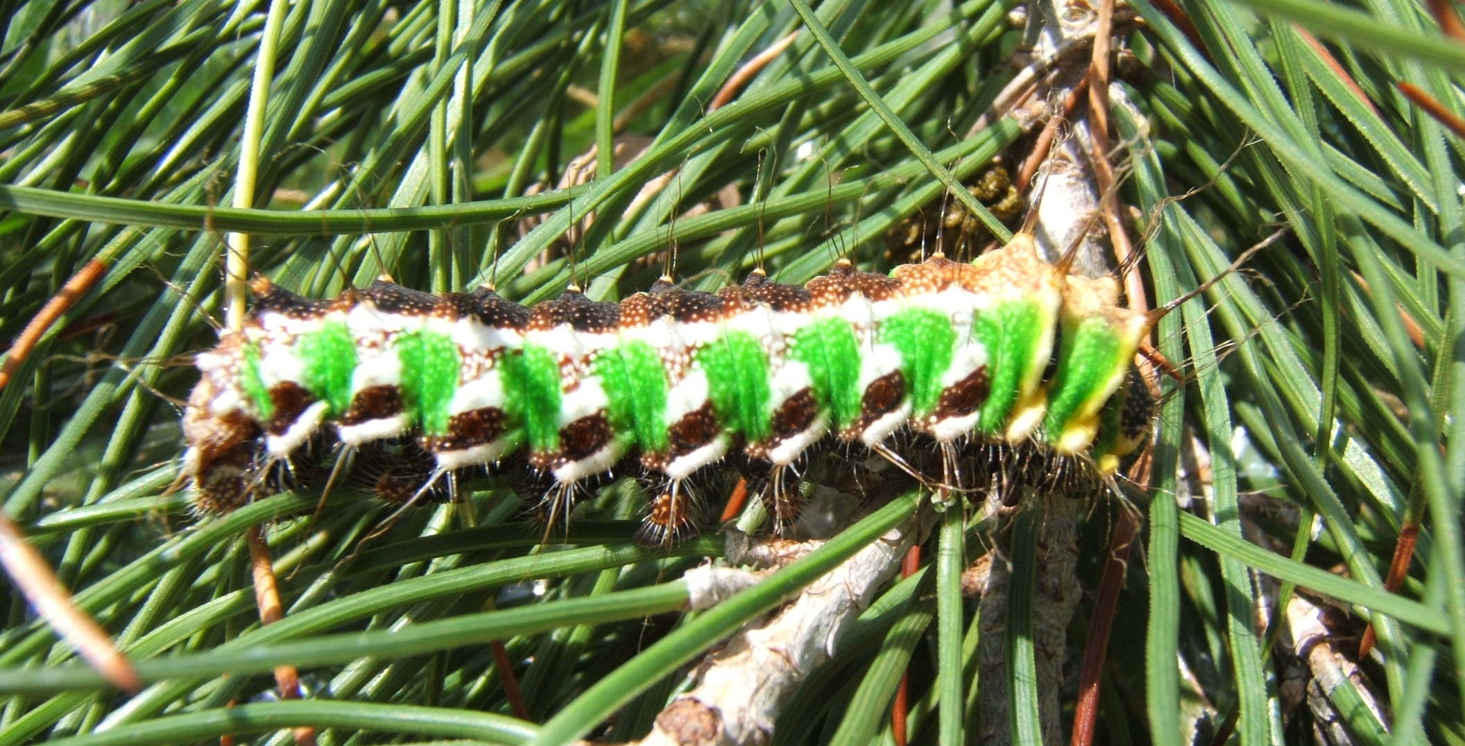 Graellsia isabellae 5th instar larva raised on Pinus.